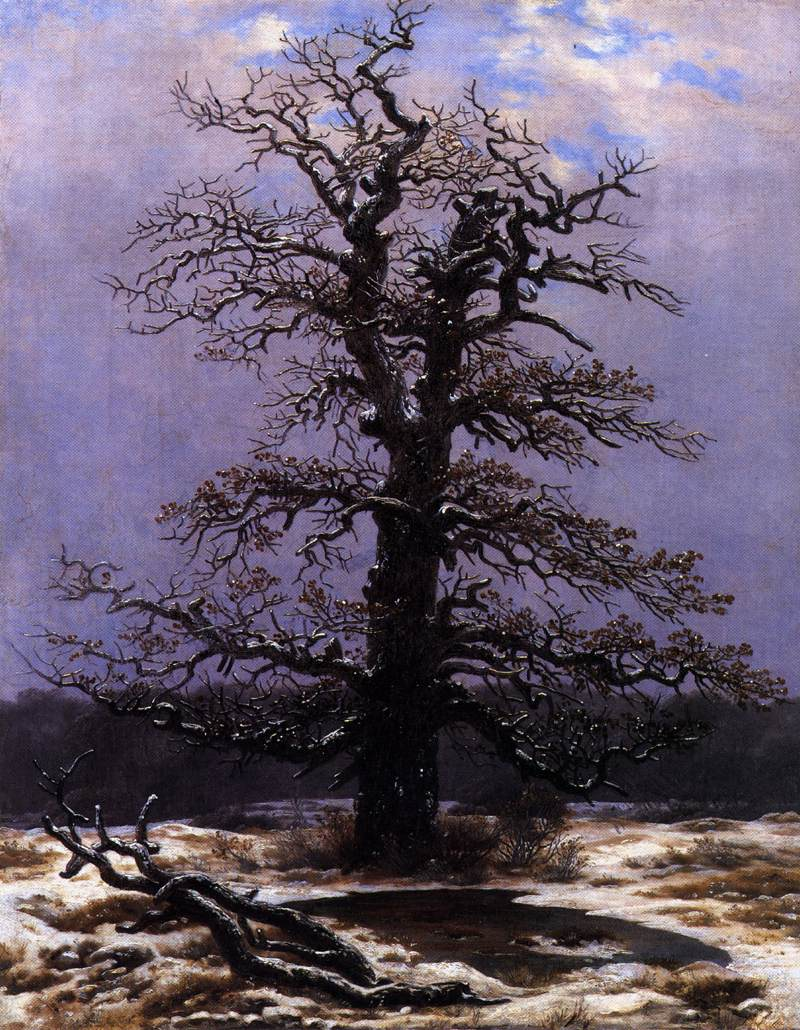 zweite Fassung von „Eiche im Schnee“